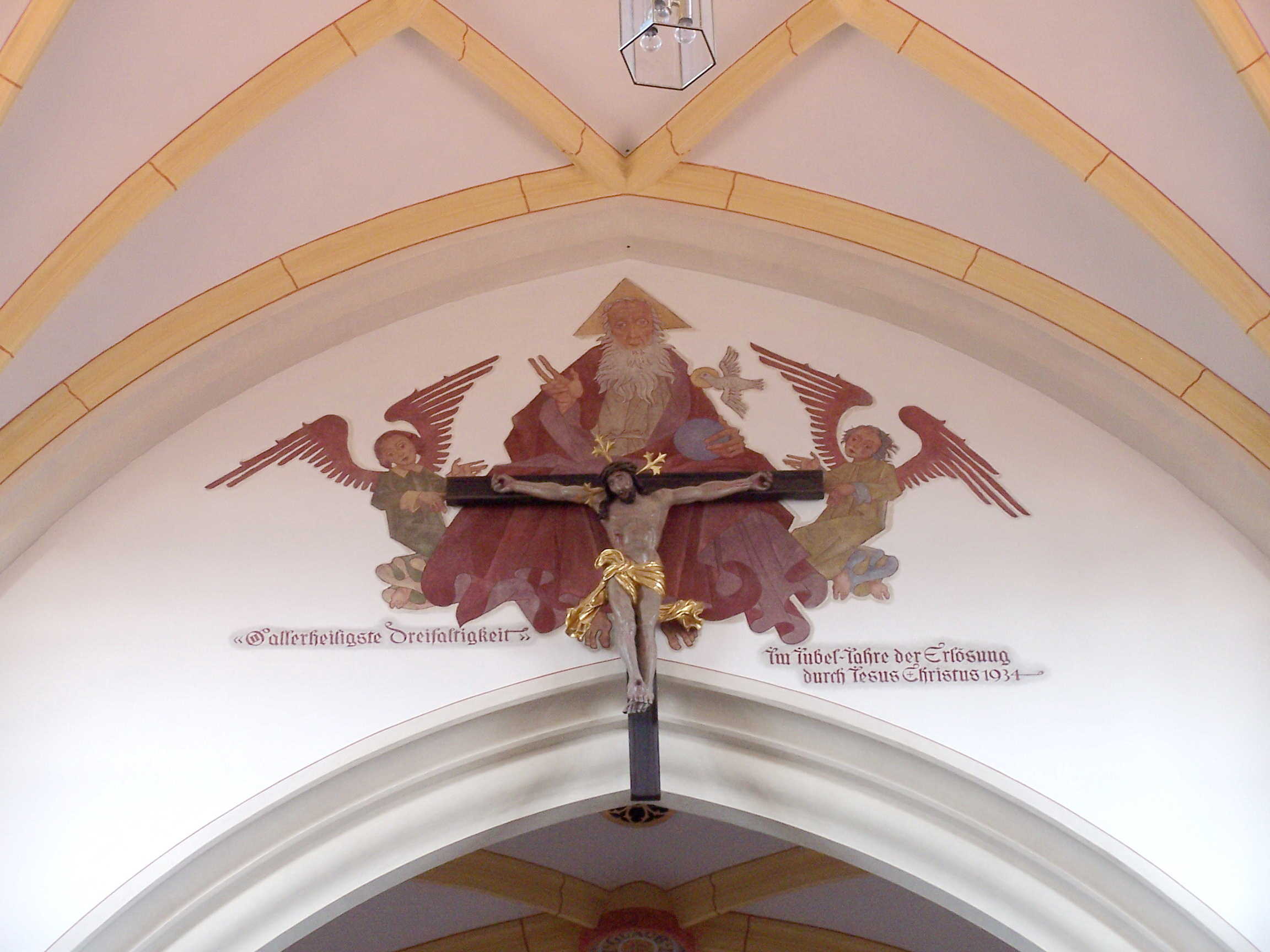 Pfeffenhausen, Kirchplatz 16. Katholische Pfarrkirche St. Martin. Neugotische Basilika, Blankziegelbau, nach Planung des königlichen Baumamtmanns Anton Völkl, 1885-87. Chorbogenkreuz um 1600 aus der Vorgängerkirche.